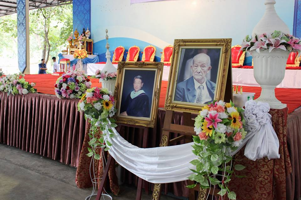 วันกตัญญู โรงเรียนสันป่าตองวิทยาคม